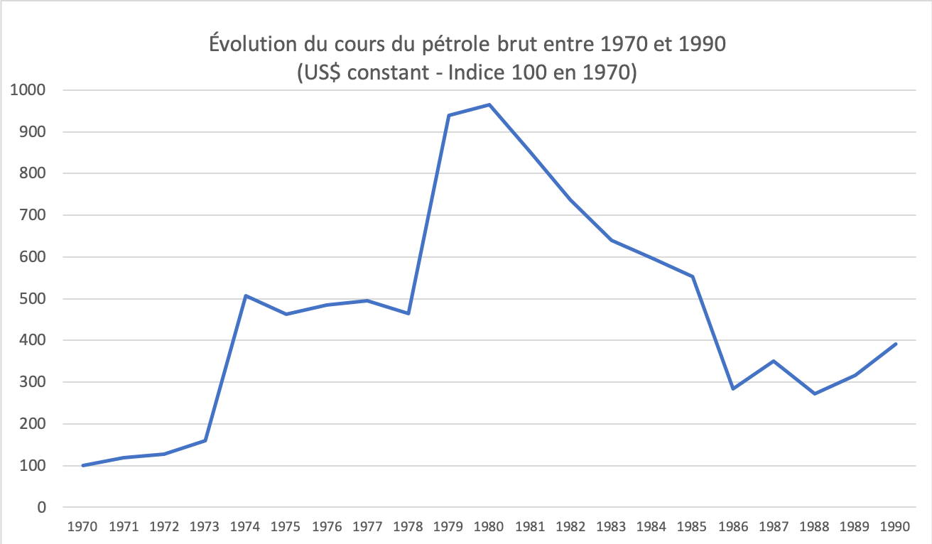 Graphique du cours du pétrole brut entre 1970 et 1990, base 100 en 1970. Source : Statistical Review of World Energy British Petroleum